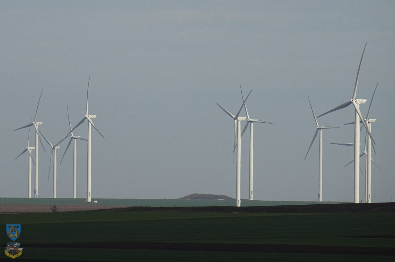 Tumuli